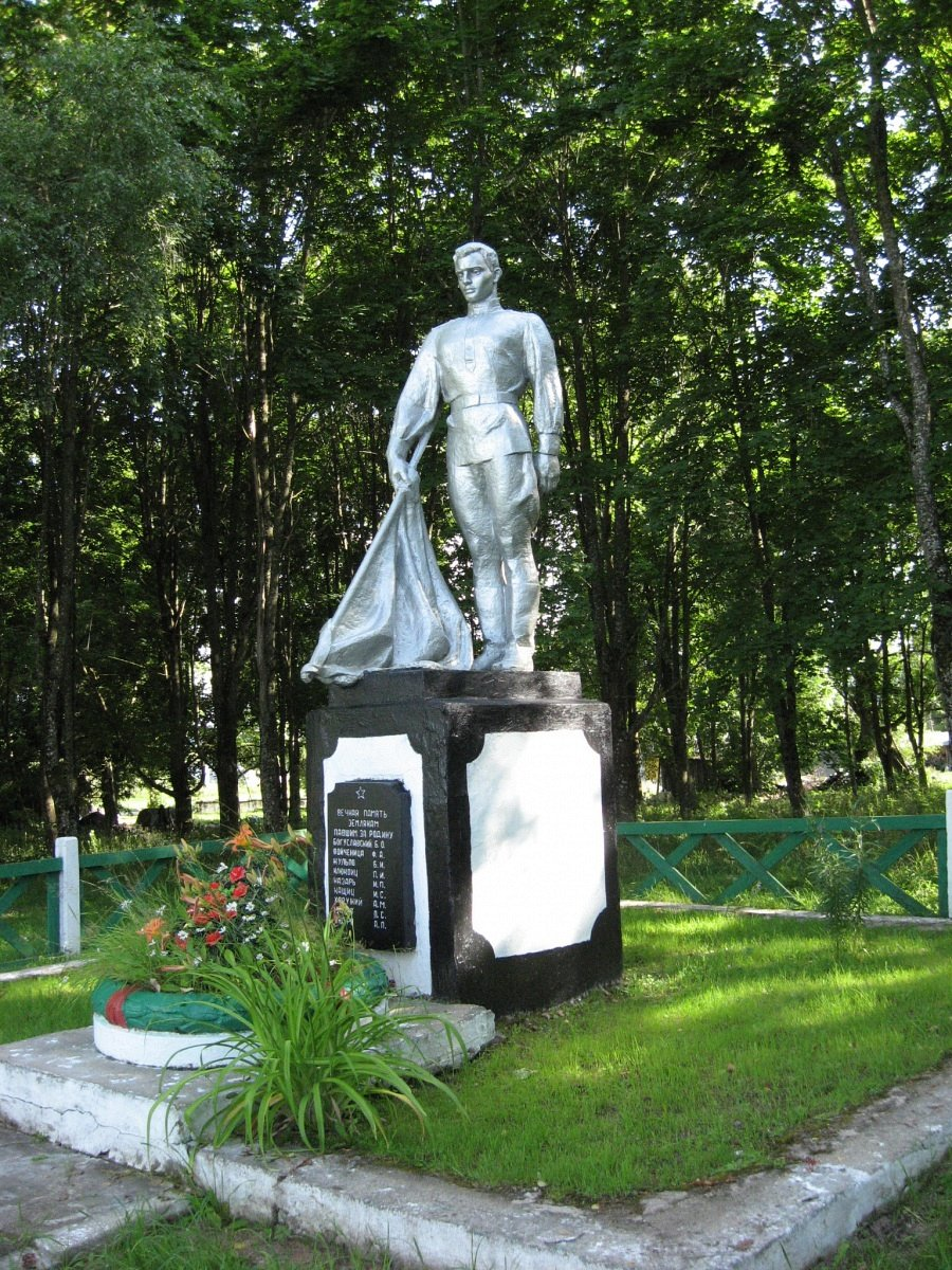 Клявіца. Помнік загінулым у гады ВАв